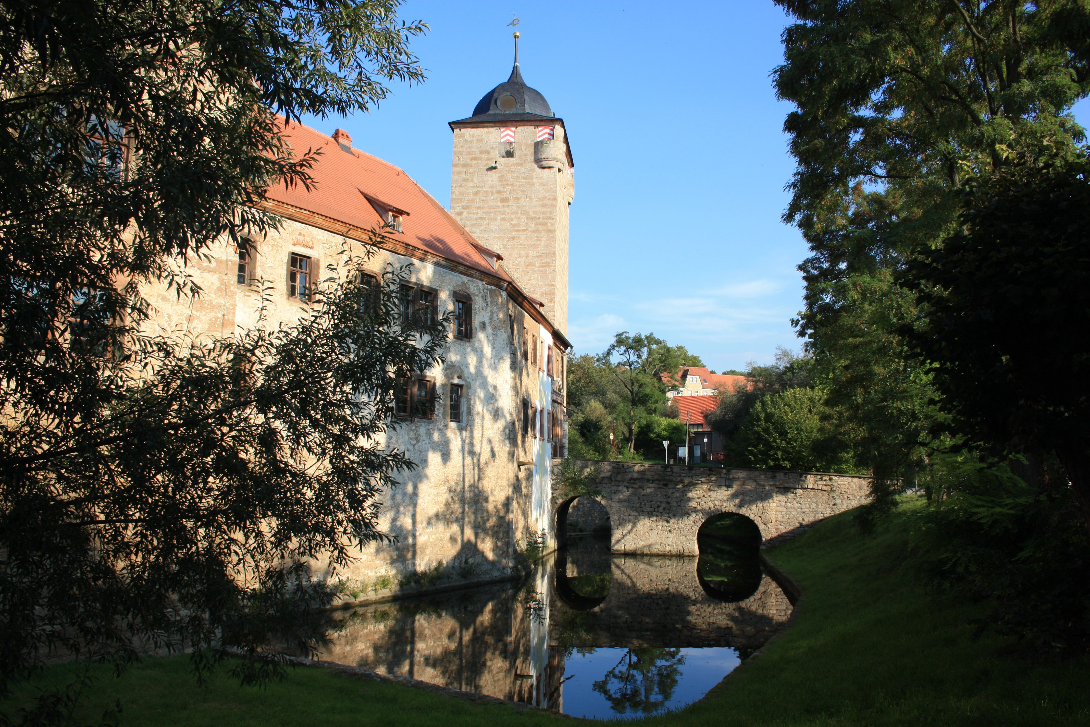 Wasserburg Kapellendorf (Südwestseite) - Kapellendorf, Weimarer Land, Thüringen, Deutschland